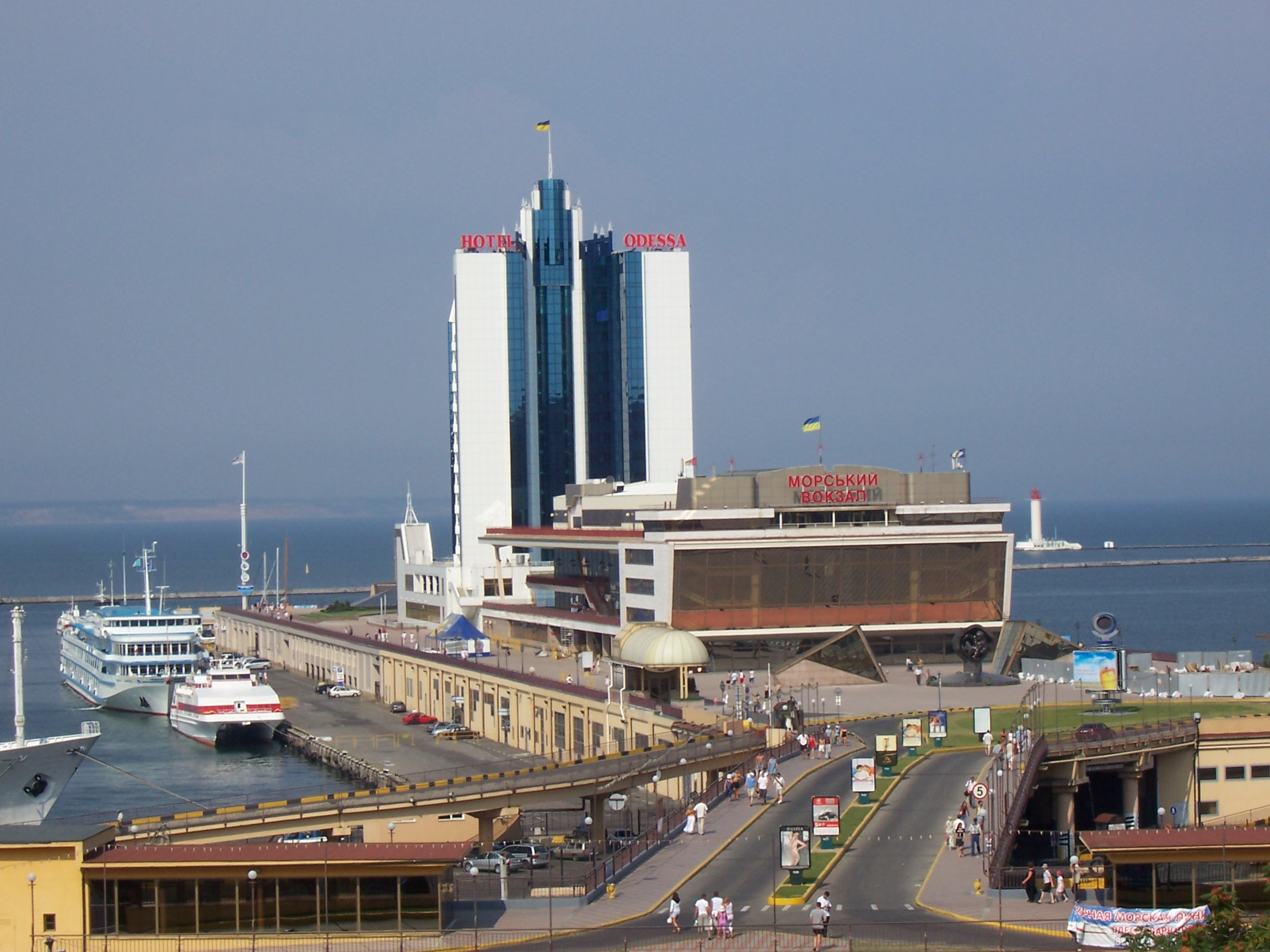 Hotel Odessa